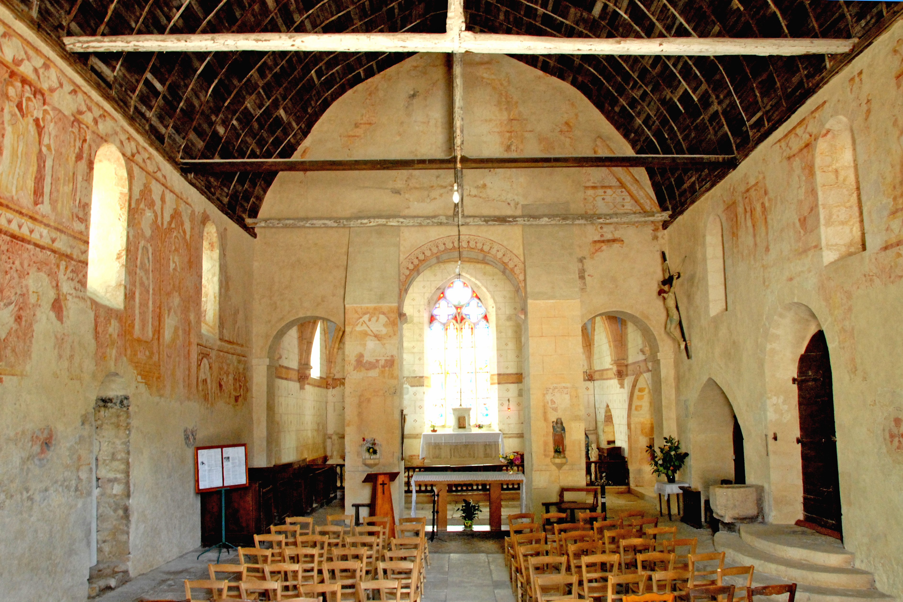 Angigny, Notre-Dame, Schiff, Chorwand